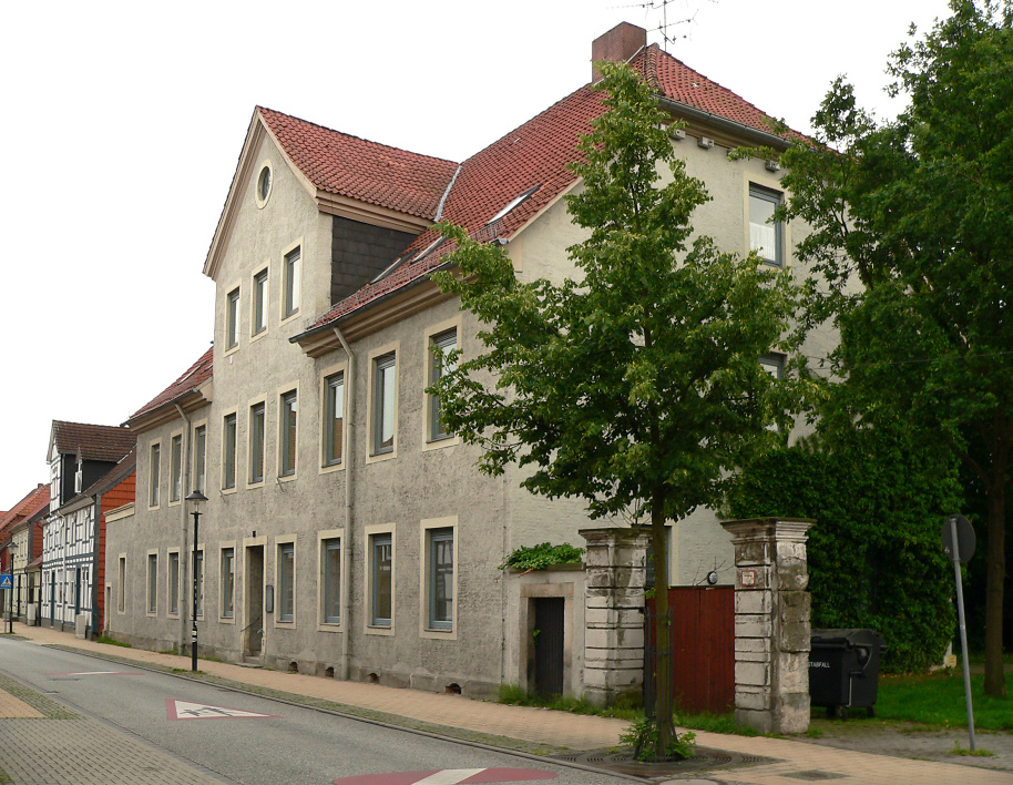 Vorsfelde, Amtsstrasse 35, früheres Amtsgebäude des Amtes Vorsfelde, später Amtsgericht Vorsfelde